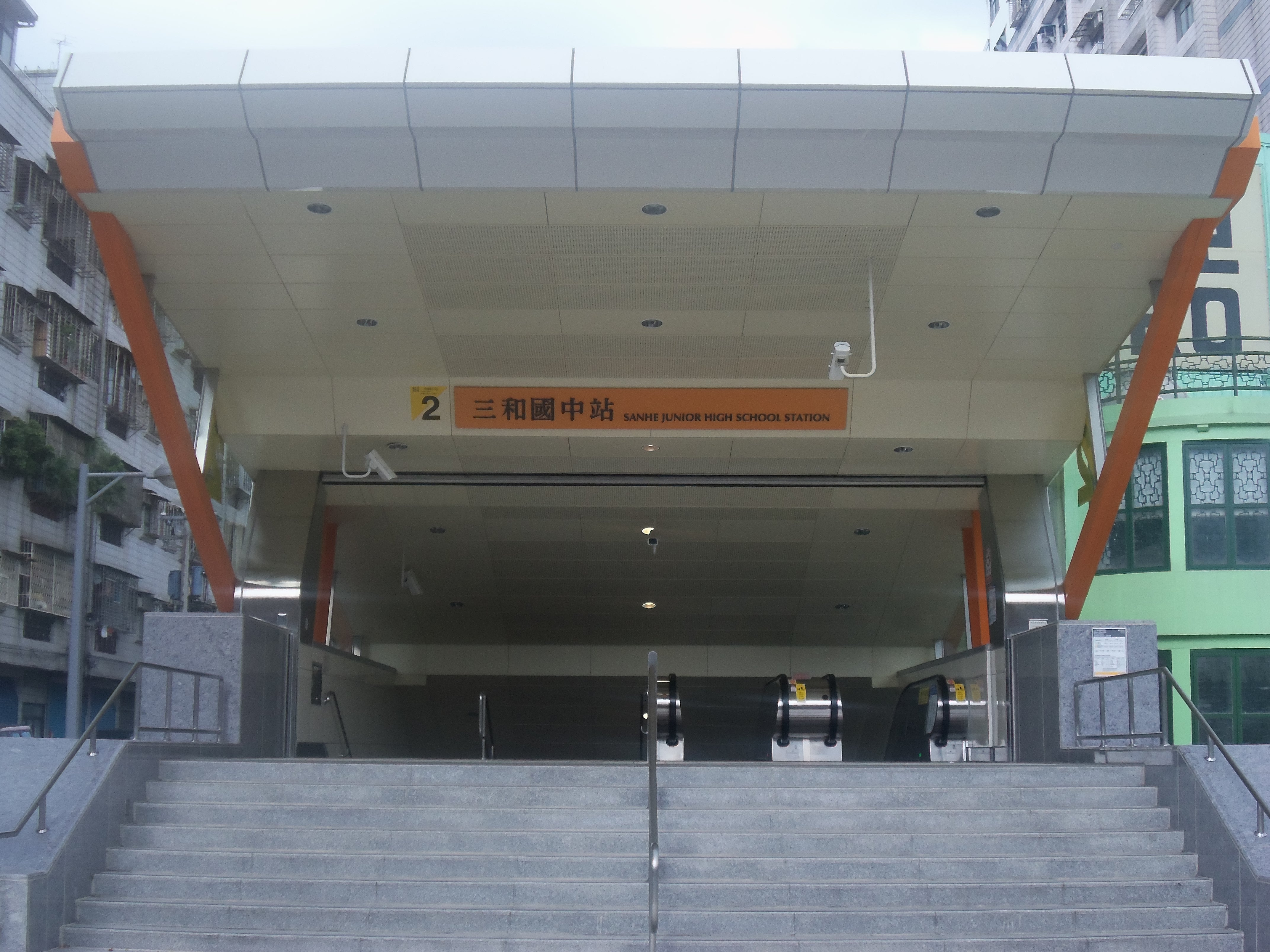 中文（台灣）: 捷運三和國中站。